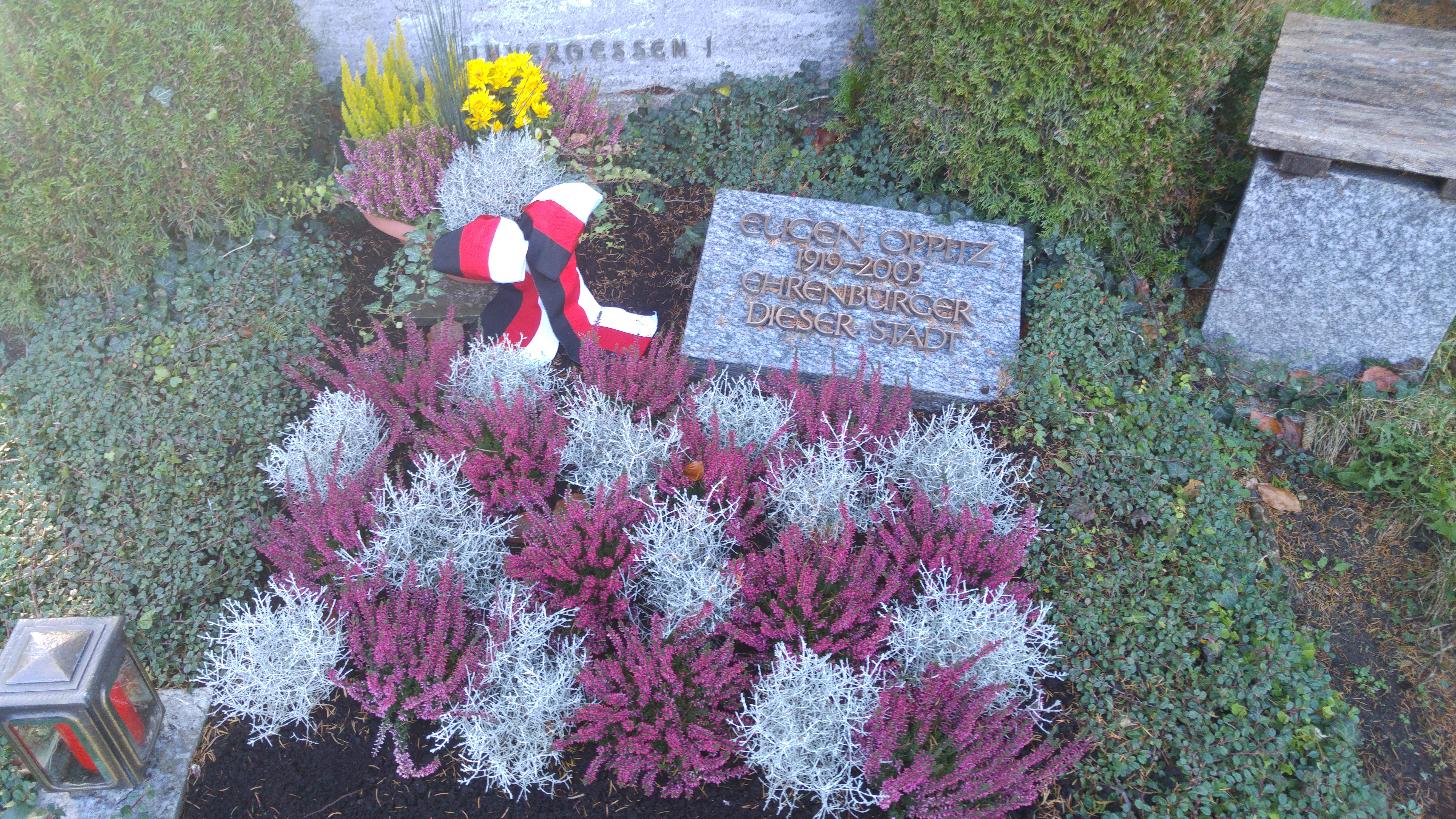 Grabstelle auf dem Waldfriedhof Memmingen des Ehrenbürgers der Stadt Memmingen Eugen Oppitz (1919-2003).